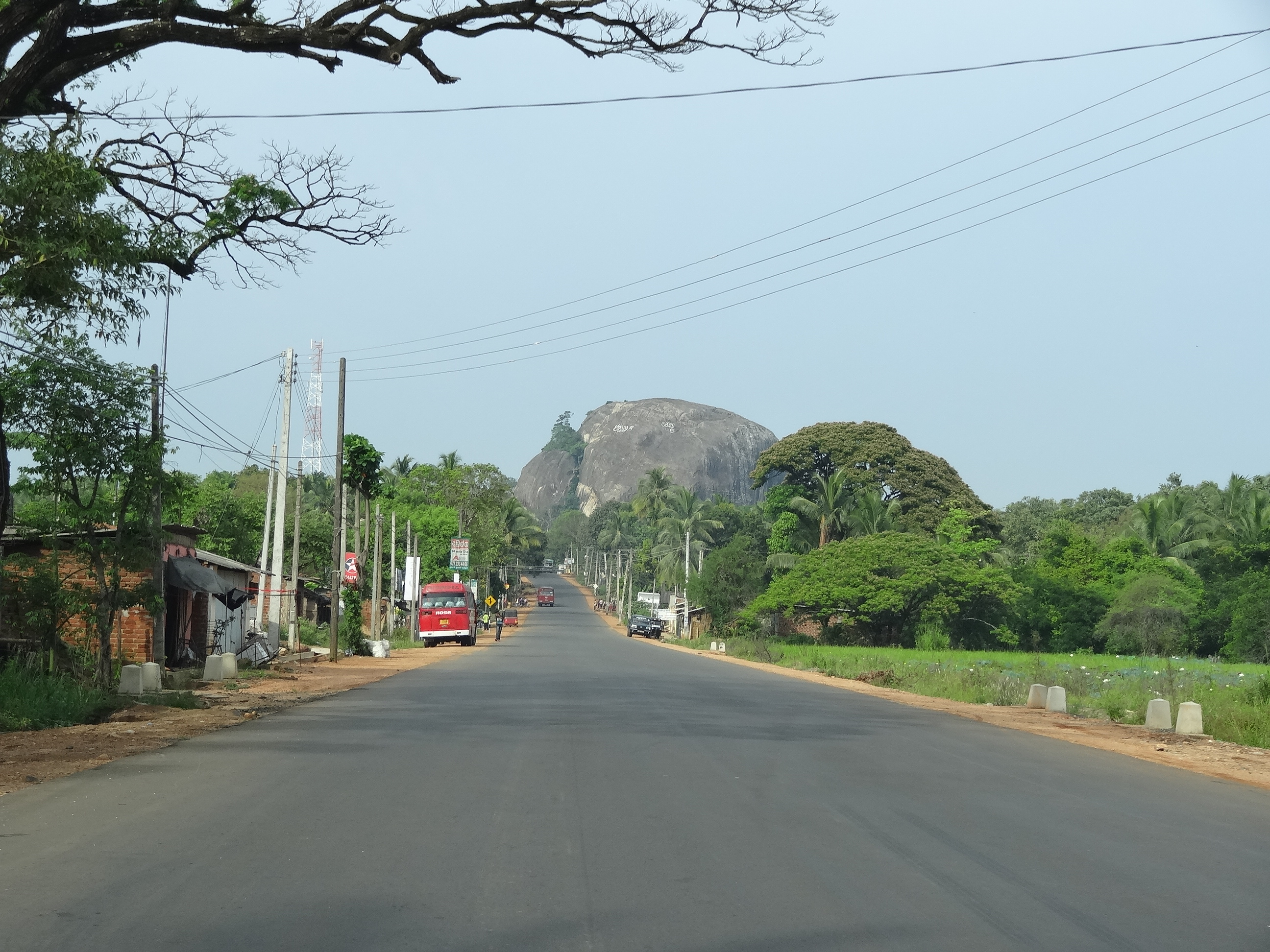 Hill near Dambulla